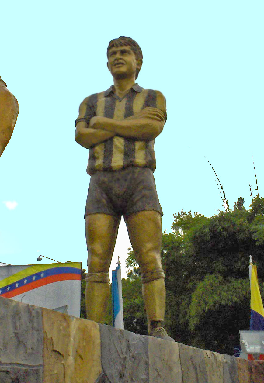 Grupo escultórico Monumento Las Américas, detalle escultura de Carlos Maldonado, jugador y técnico del Deportivo Táchira